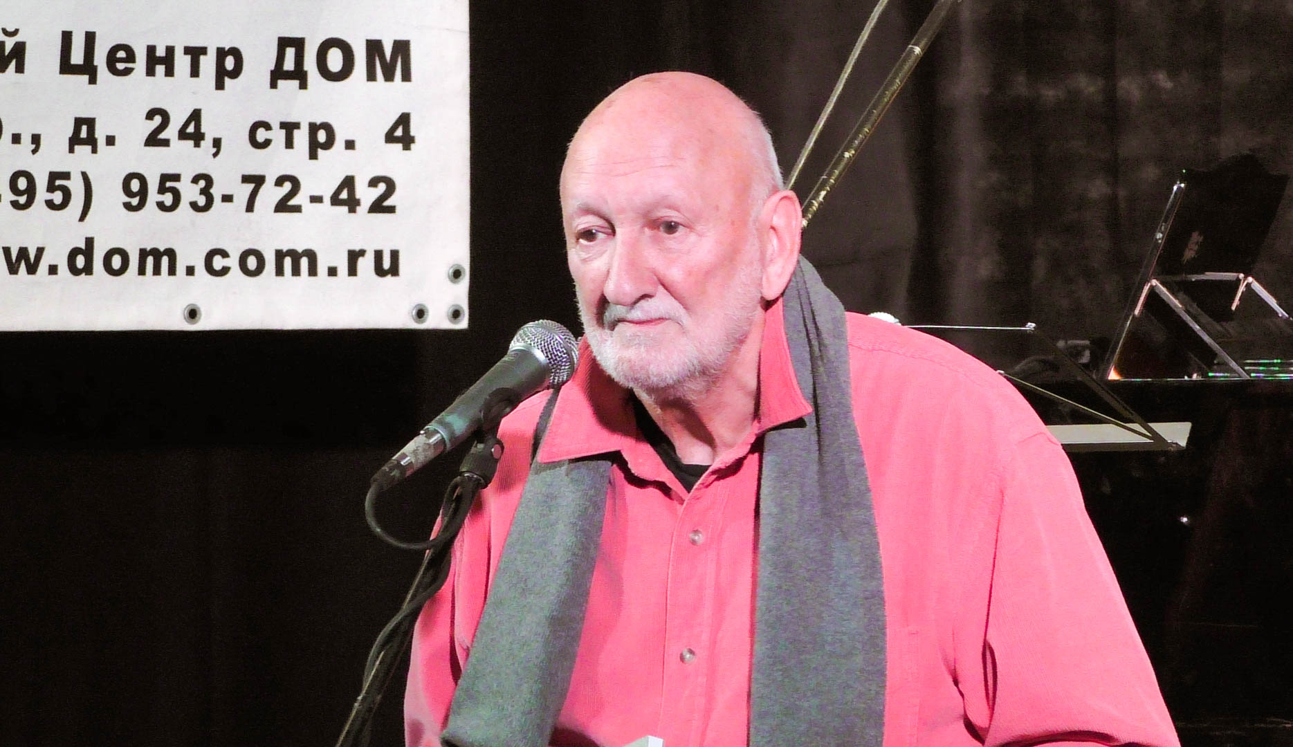 13.10.2017. КЦ ДОМ, Концерт в рамках совместного проекта фестиваля Гёте-Института "Джаз осенью" и фестиваля Leo Records.